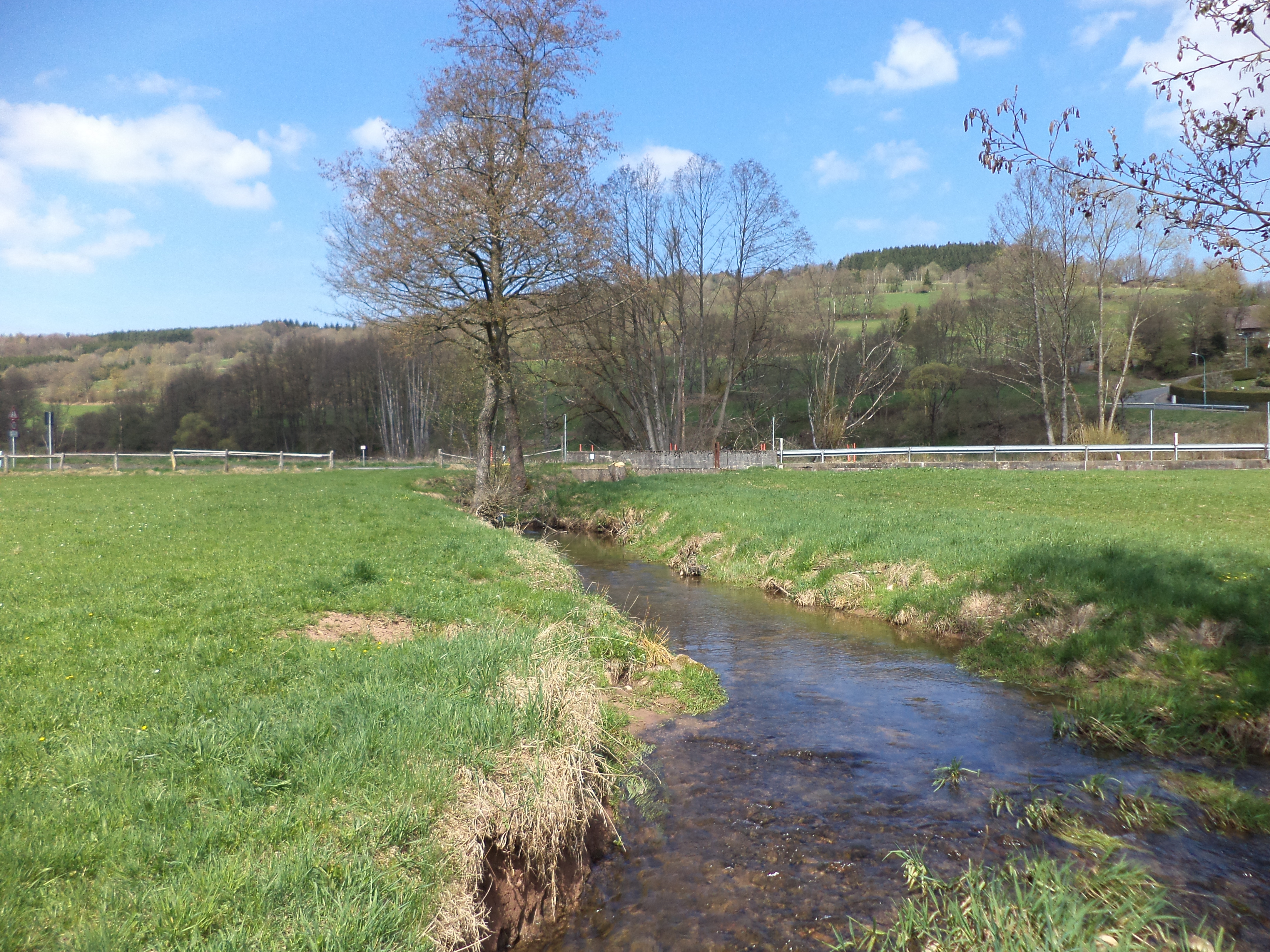 Die Gronau bei Neuengronau nach dem Zusammenfluss der Quellbäche